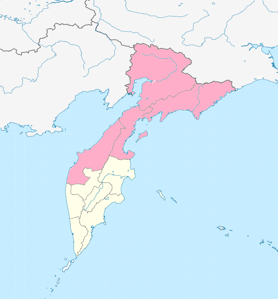 Корякский округ